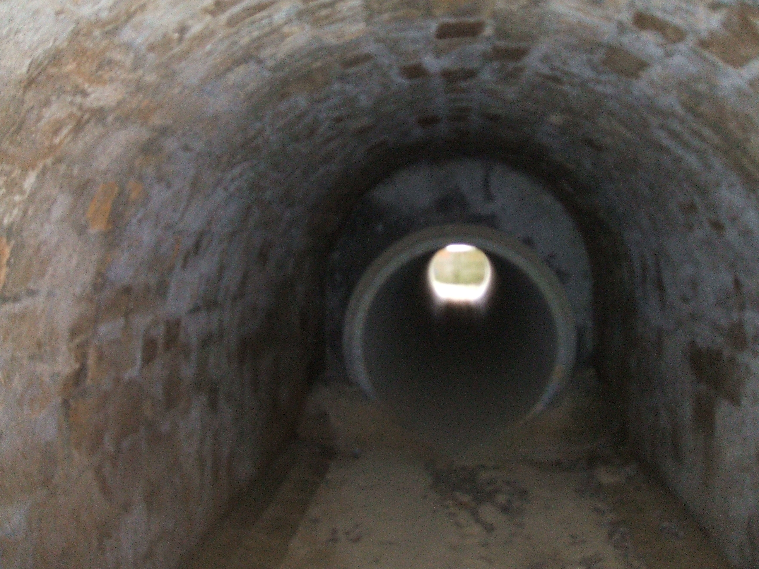 Nach dem "Anbau" der neuen B 3 an die Main-Weser-Bahn musste der Durchlass des Säckelgrabens verlängert werden, durch Betonrohre